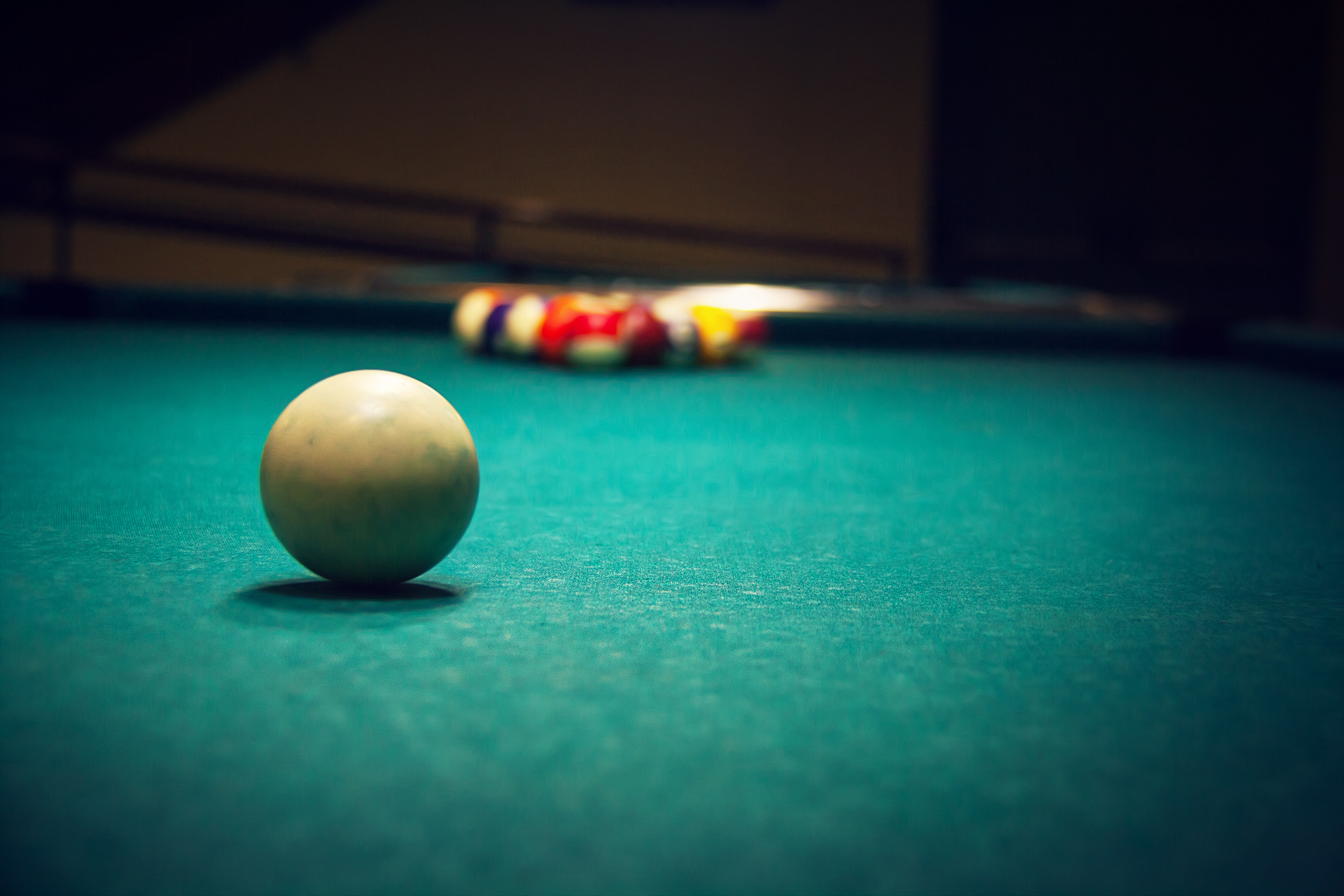 Zaragoza, España